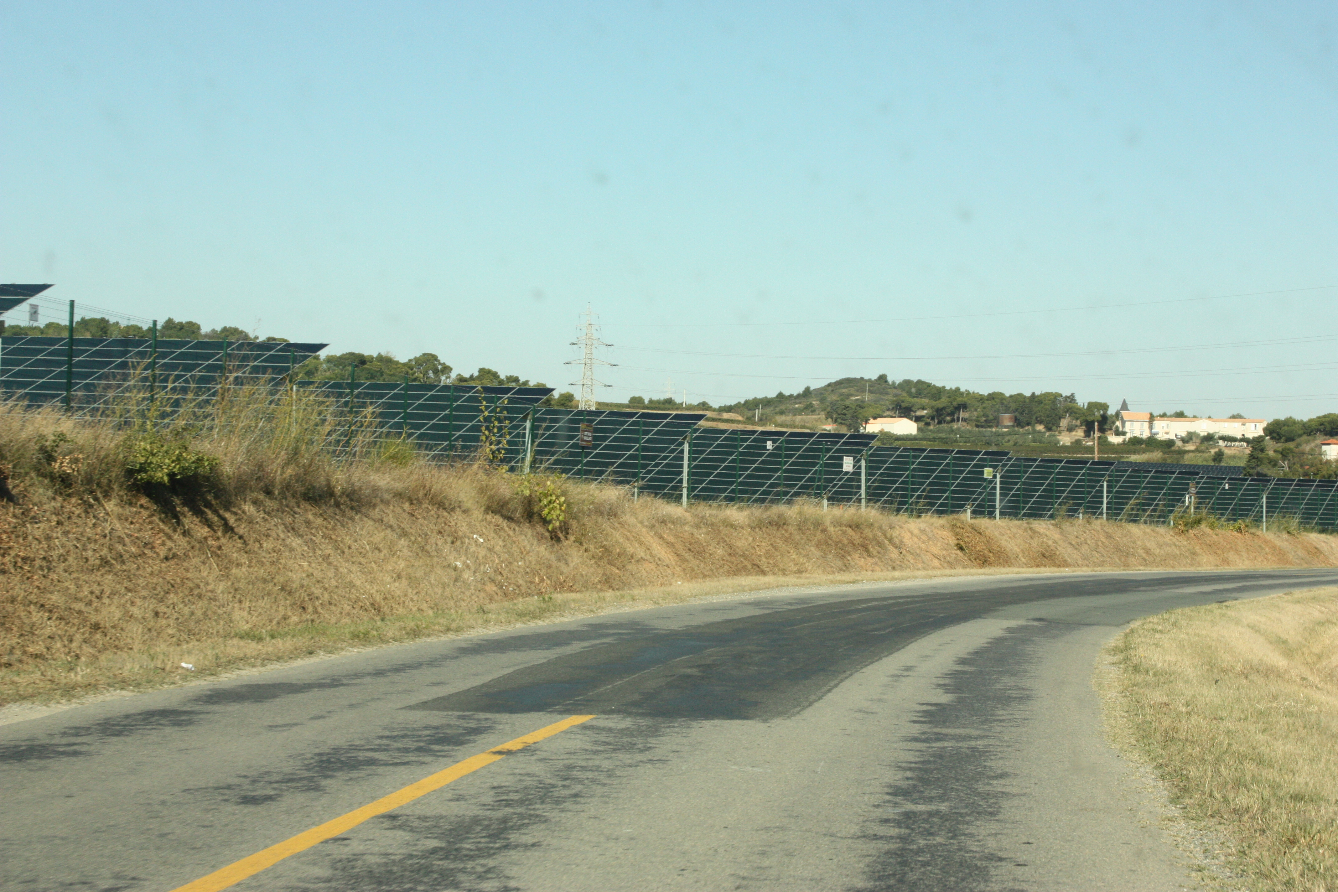 Photo de la centrale solaire de la Narbonnaise (zone industrielle de Malvezy) prise depuis la route.